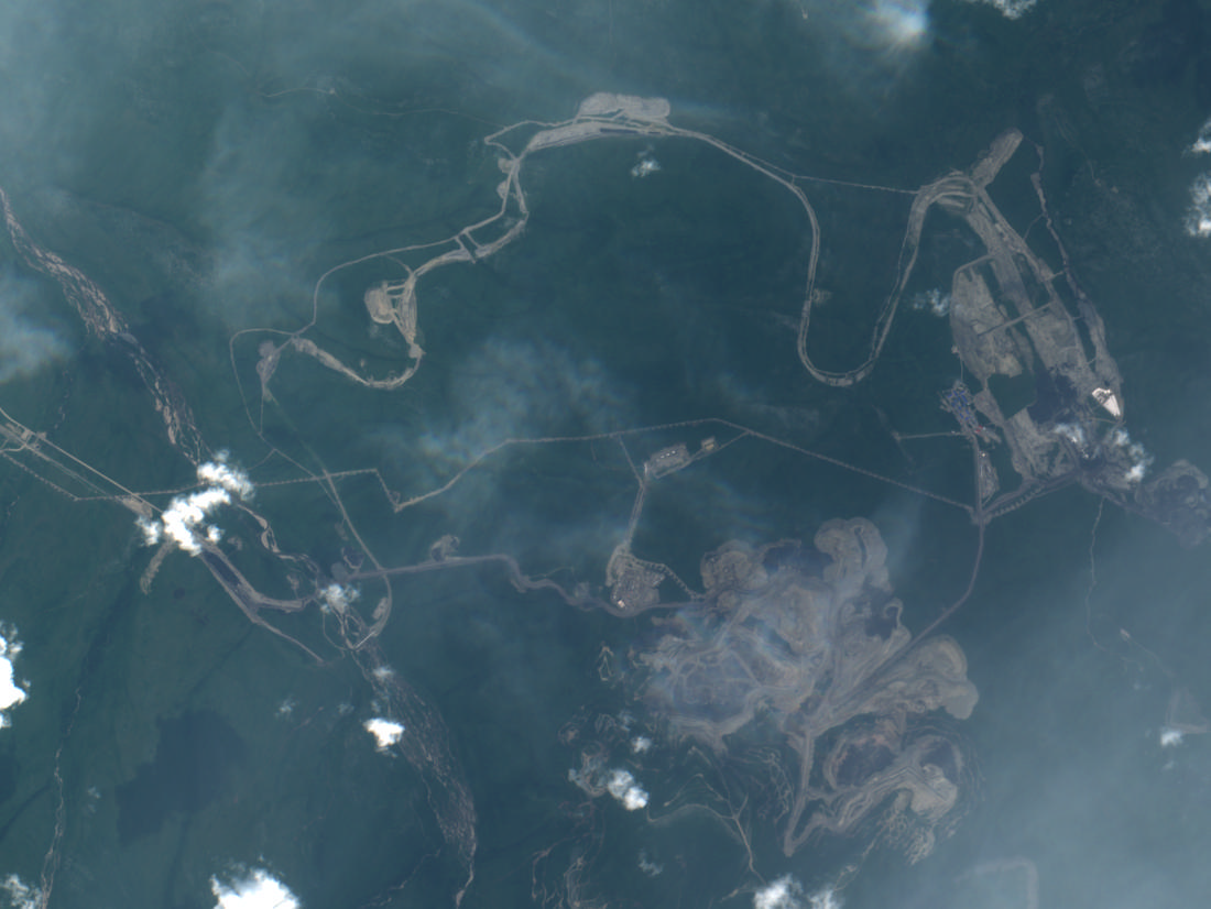 Эльгинское угольное месторождение,космический снимок Sentinel-2 S2A_MSIL1C_20190807T023551_N0208_R089_T52VEH_20190807T053641, пространственное разрешение 10 м